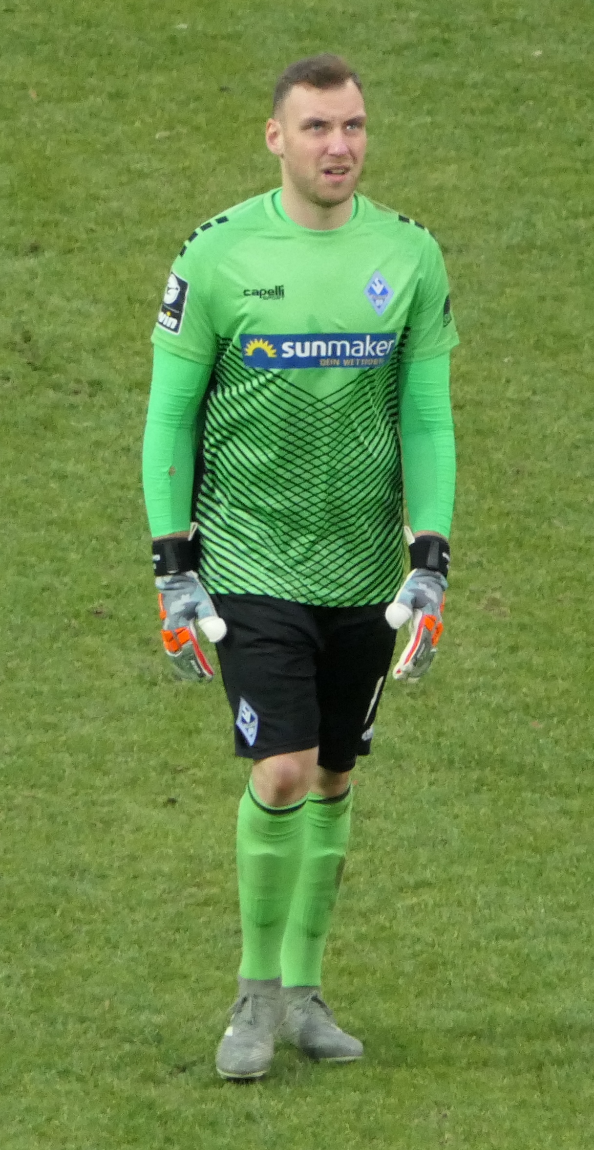 Der Fussballprofi Timo Königsmann im Trikot vom SV Waldhof Mannheim beim Heimspiel gegen Eintracht Braunschweig am 08.12.2019.